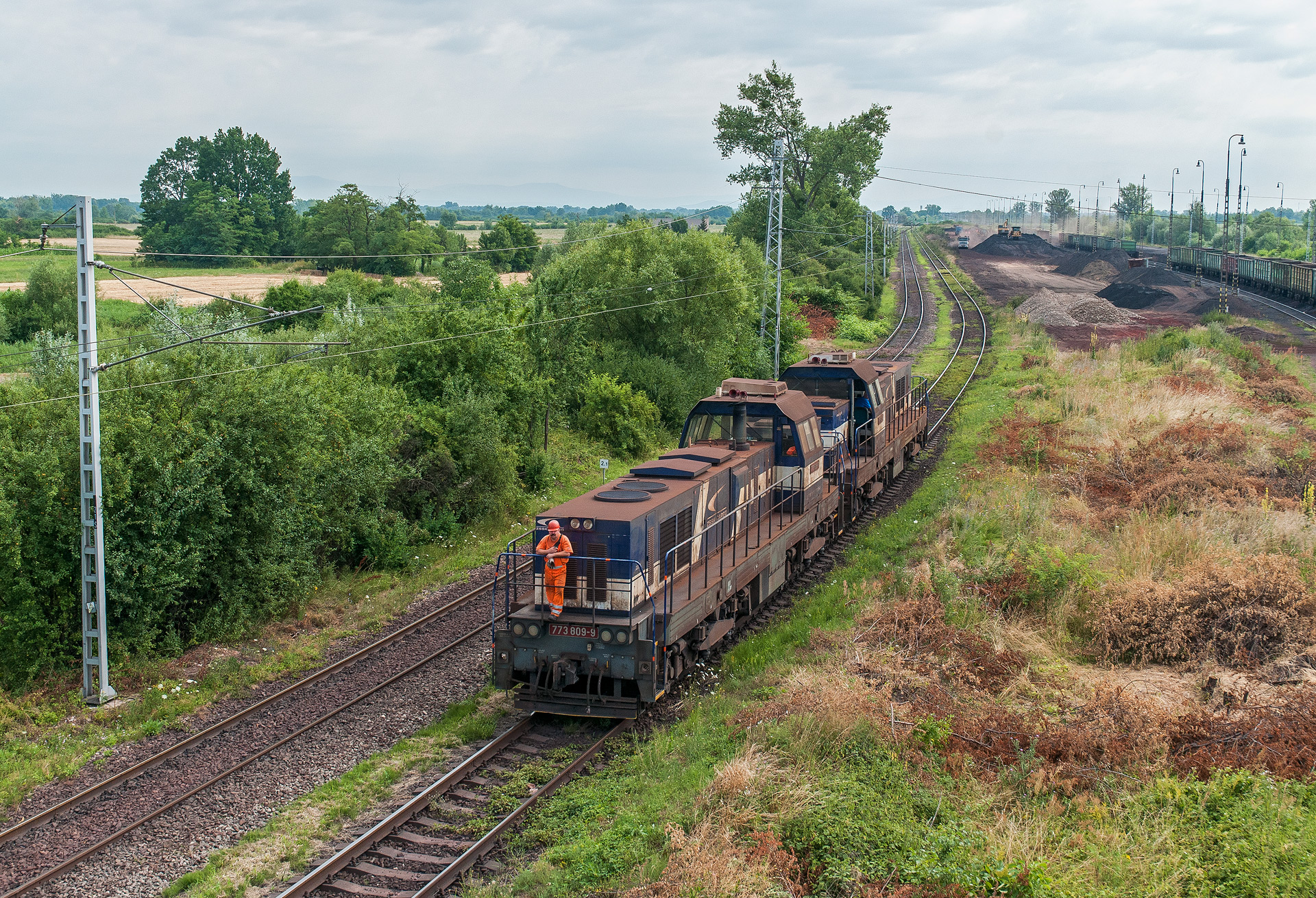 Širokorozchodné motorové lokomotivy 773.809 a 803 při posunu na překladišti v Čierné nad Tisou